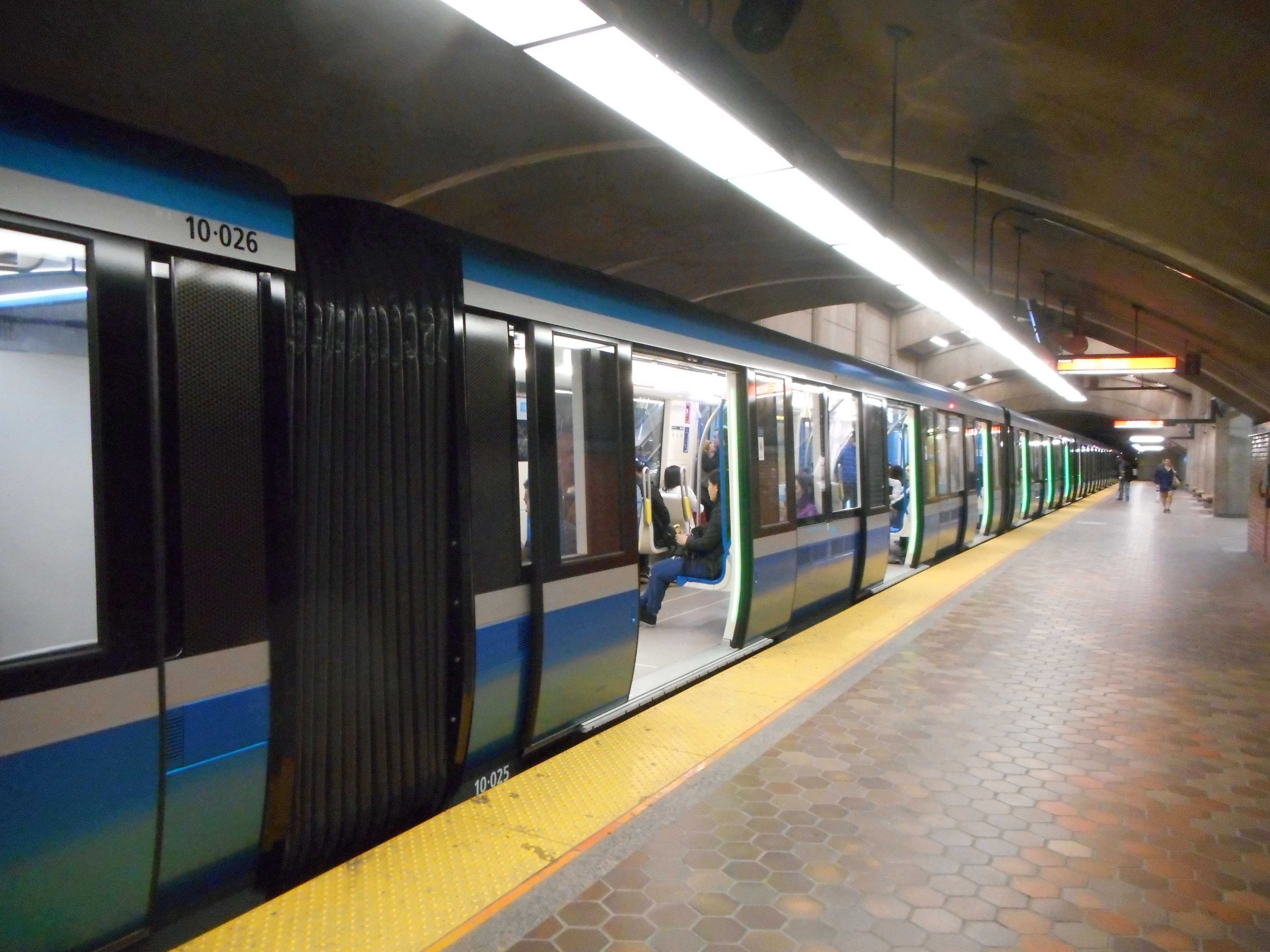 Le MPM-10 (acronyme pour « Matériel pneumatique de Montréal 2010 ») ou Azur Quai de la station Place-Saint-Henri